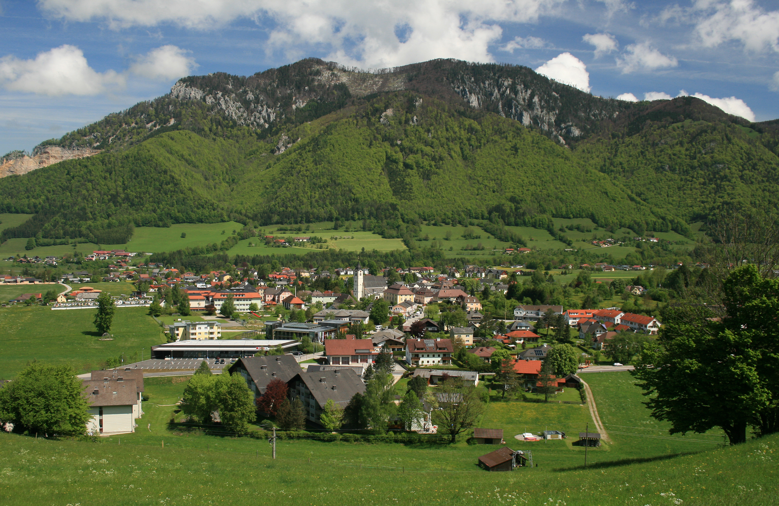 Blick auf die Marktgemeinde Molln